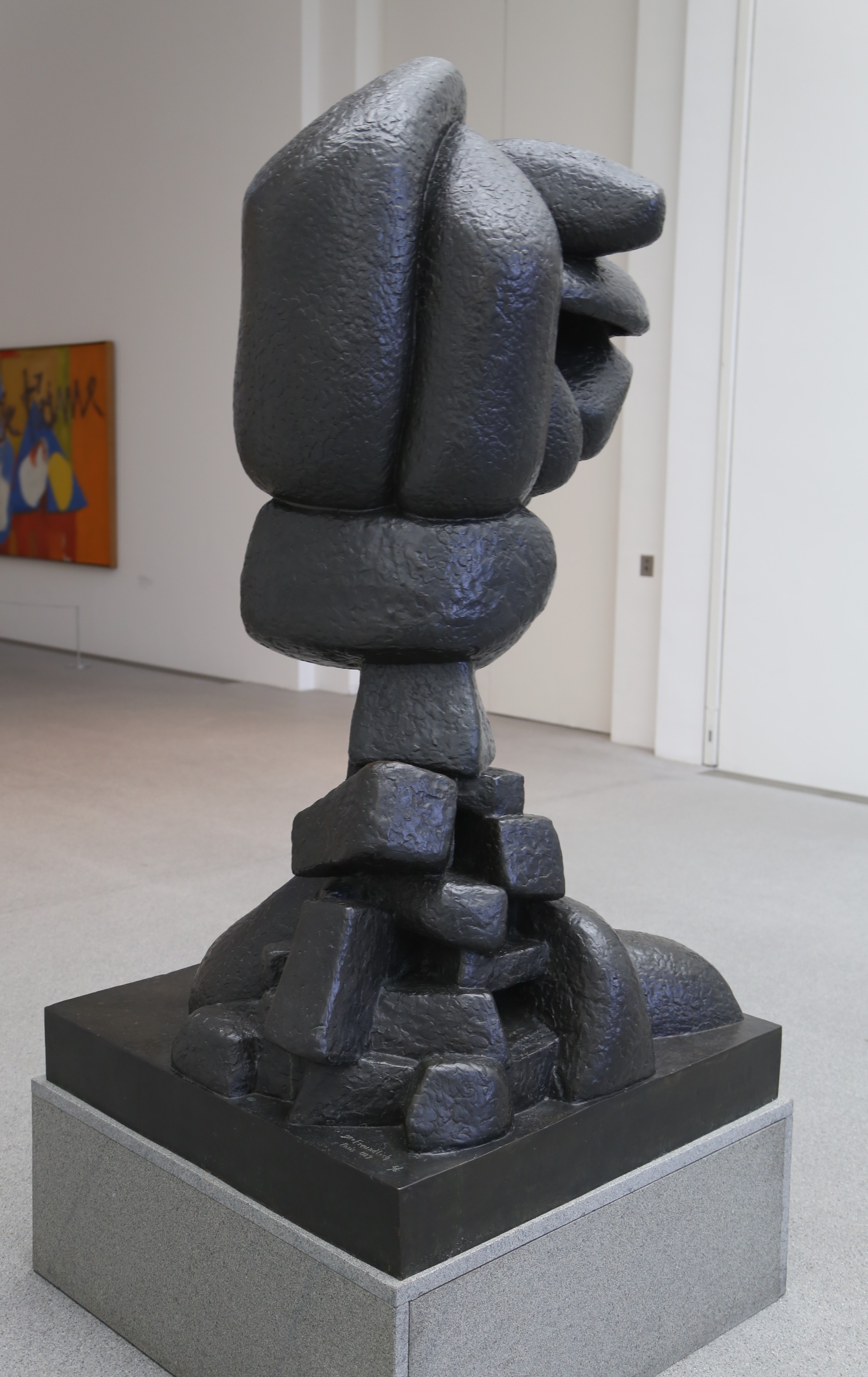 Otto Freundlich: Ascension (Aufstieg), 1929. Bronze. Pinakothek der Moderne (Schenkung der Theo Wormland-Stiftung), München